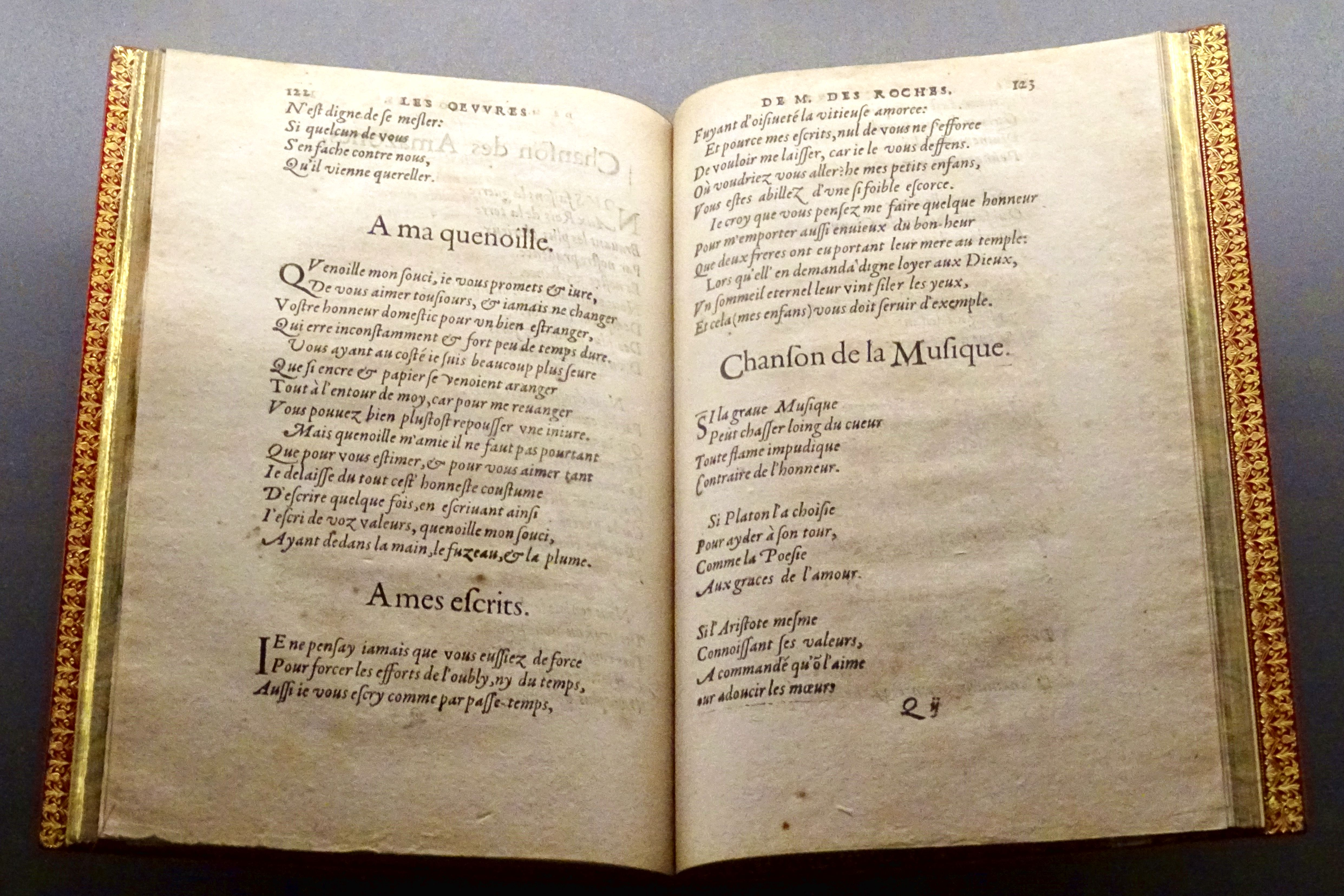 Bibliothèque Condé, Madeleine des Roches et Catherine, Les Œuvres de Mesdames Des Roches, de Poitiers, mère et fille, Paris, Abel l'Angelier, 1579.